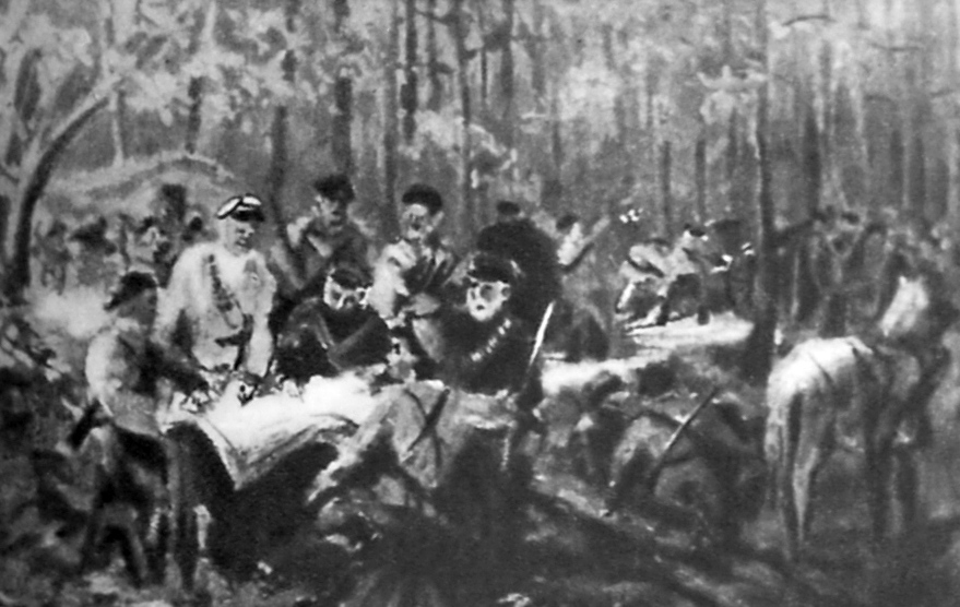 Партызанскі штаб